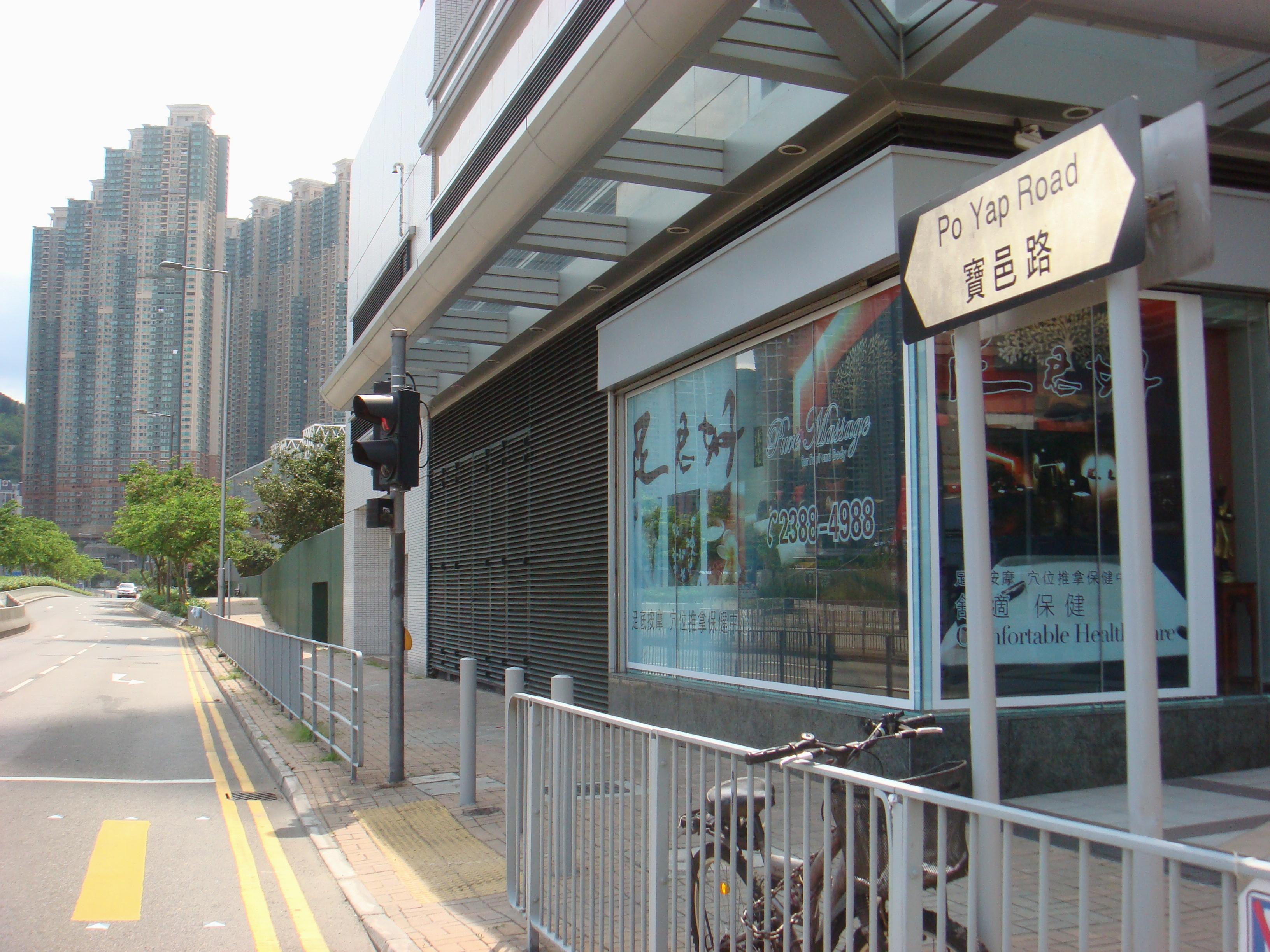 寶邑路鄰近將軍澳中心路段